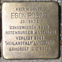 StdStpStBio012 ; Egon Rösing